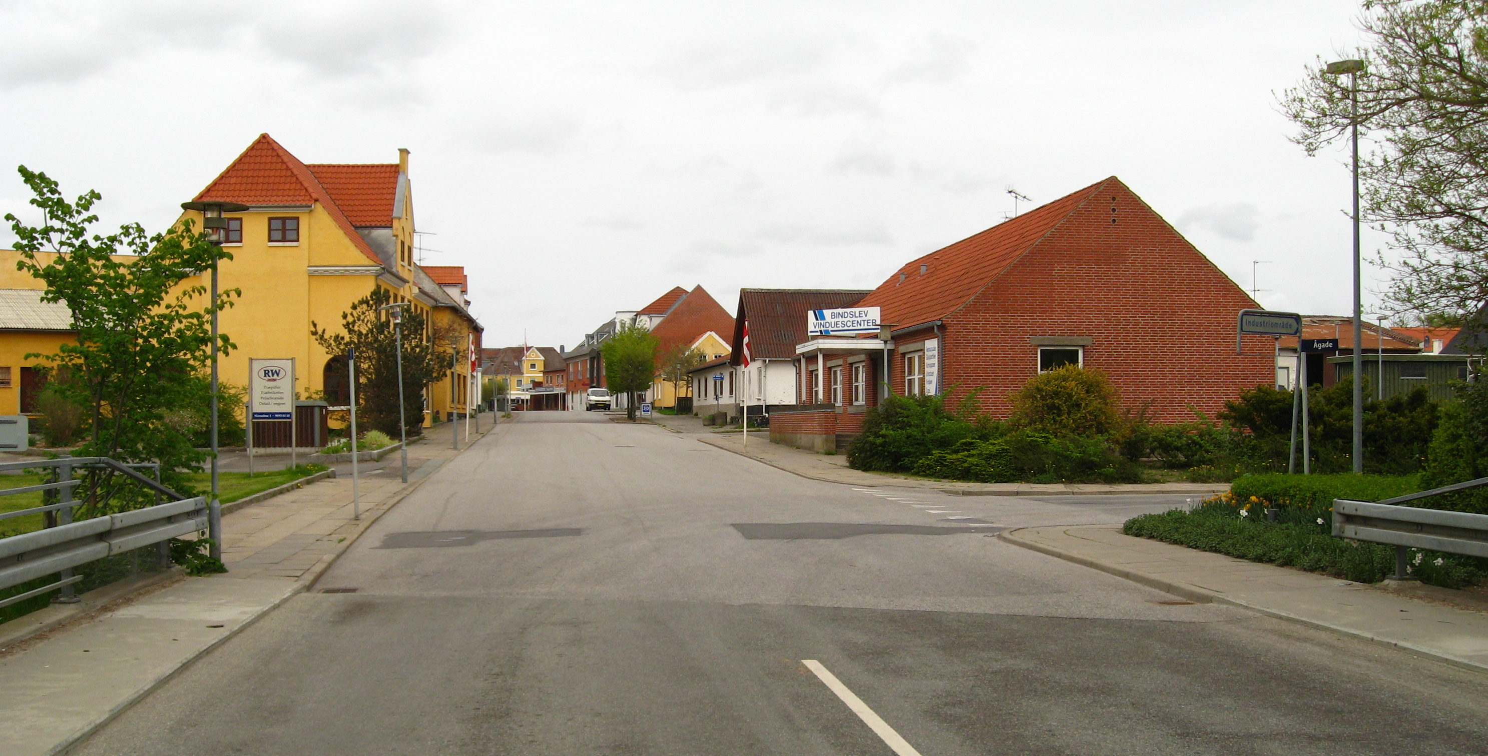 Bindslev, Hjørring Kommune